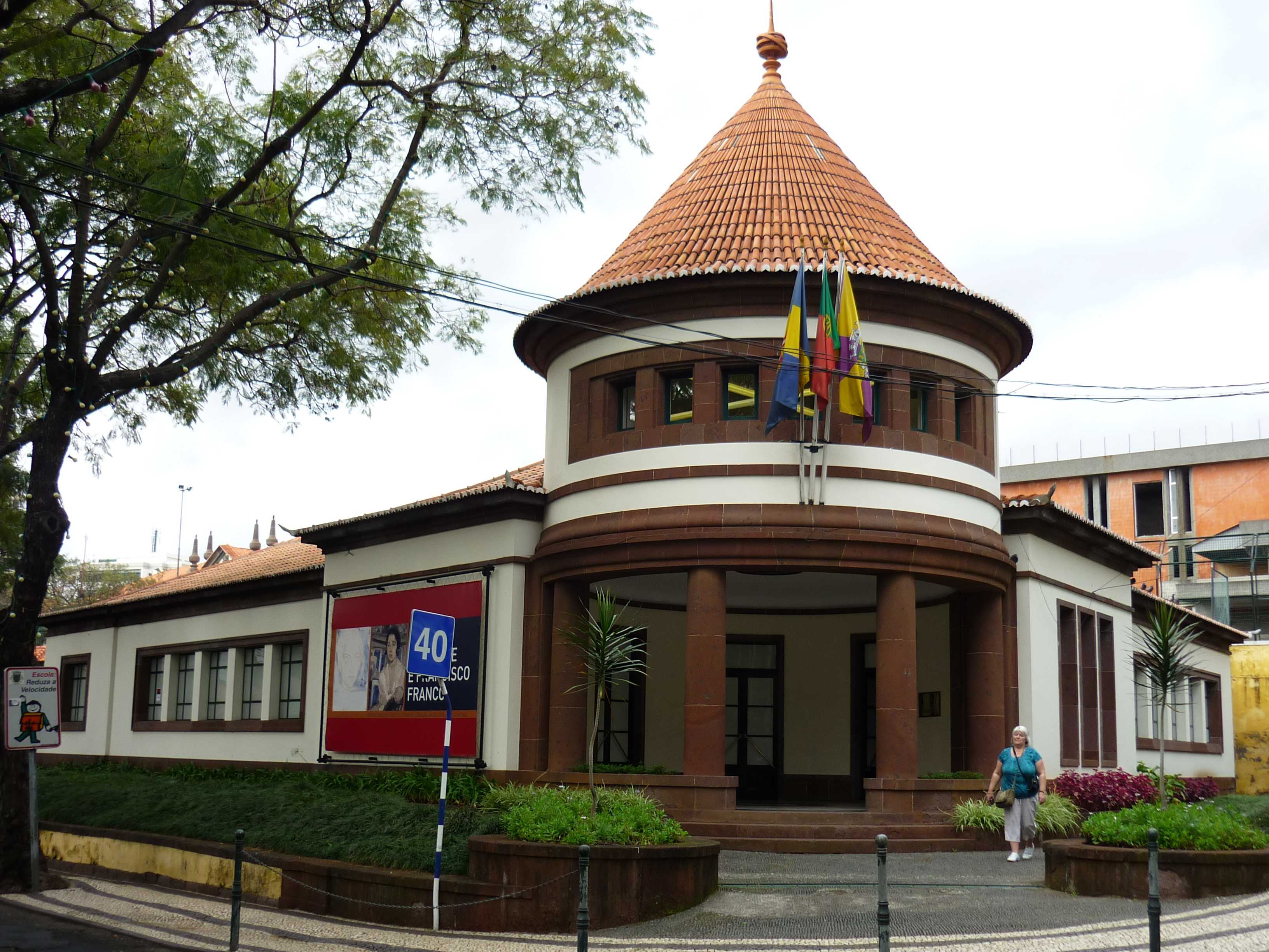 A Franco-testvérek múzeuma (Museu Henrique e Francisco Franco) Funchalban (Madeira)